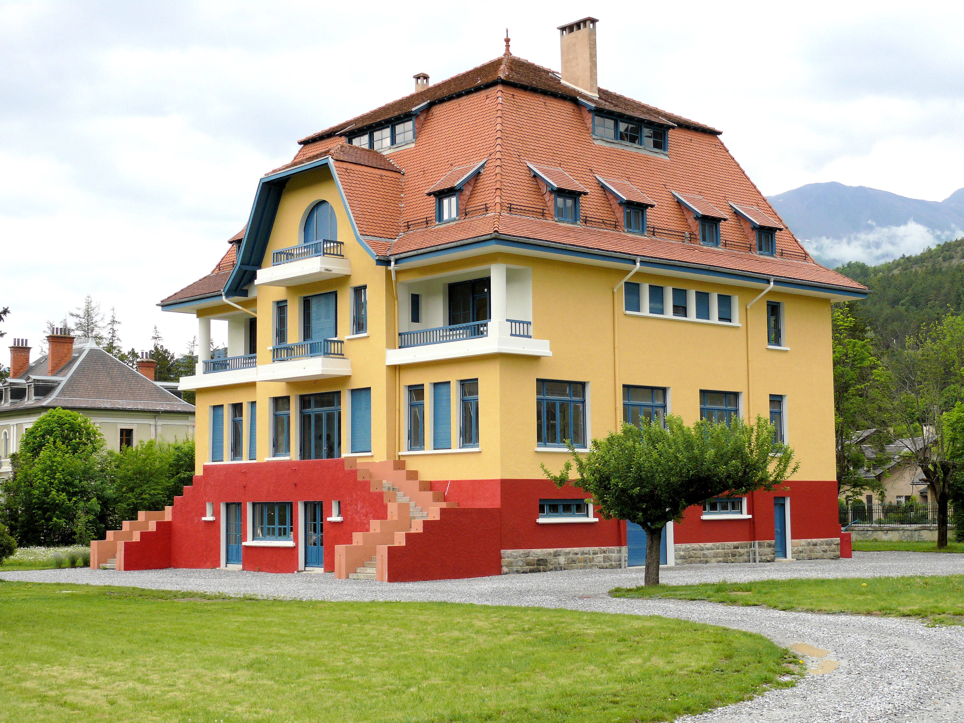 Barcelonnette - Villa mexicaine - Villa Bleue après restauration